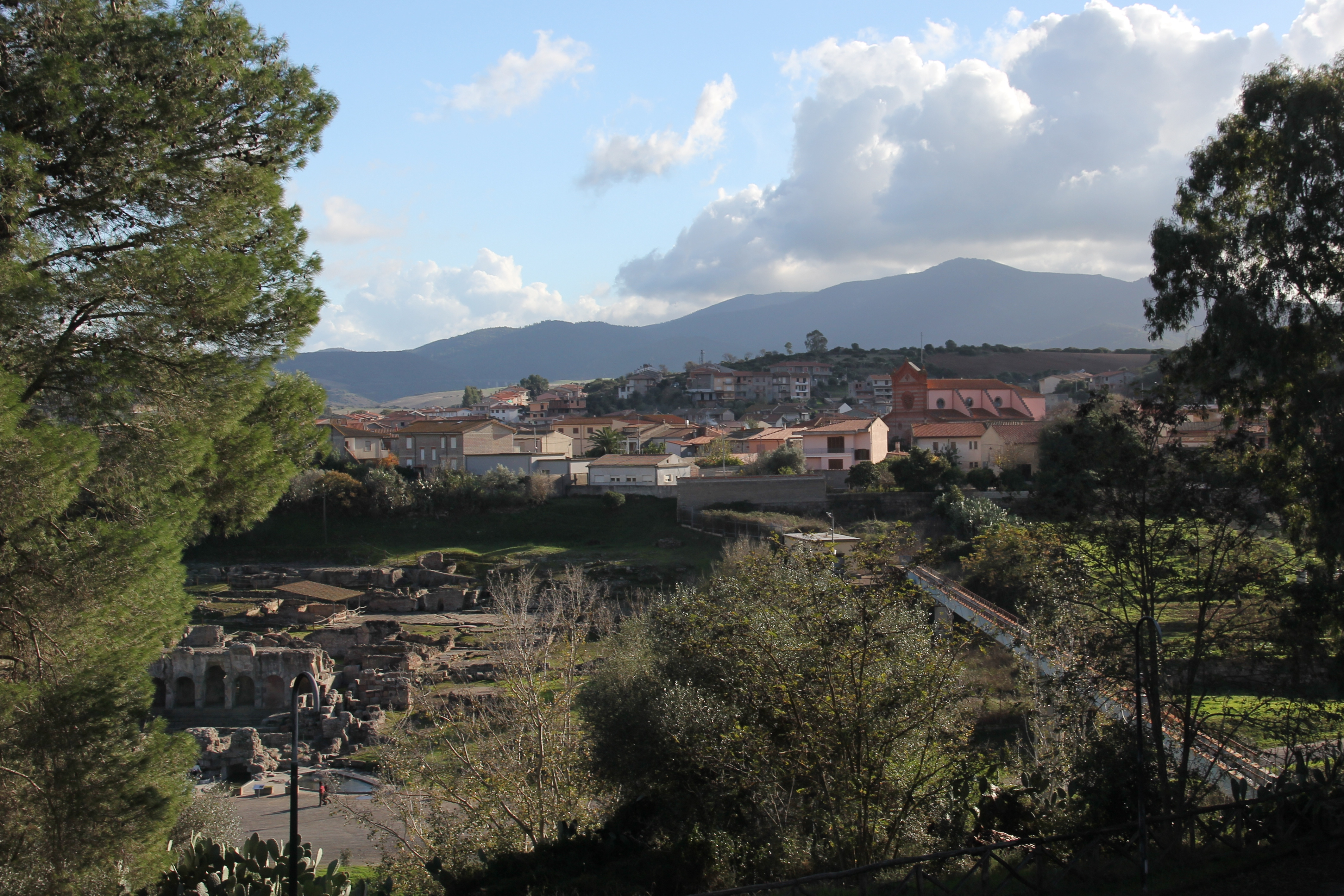 Fordongianus - Panorama